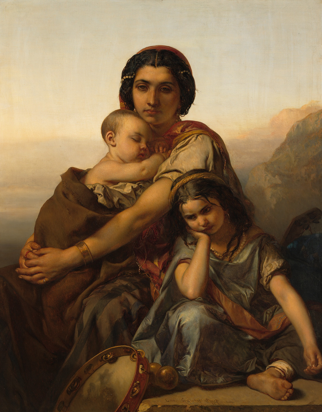 schilderij; genre; kind